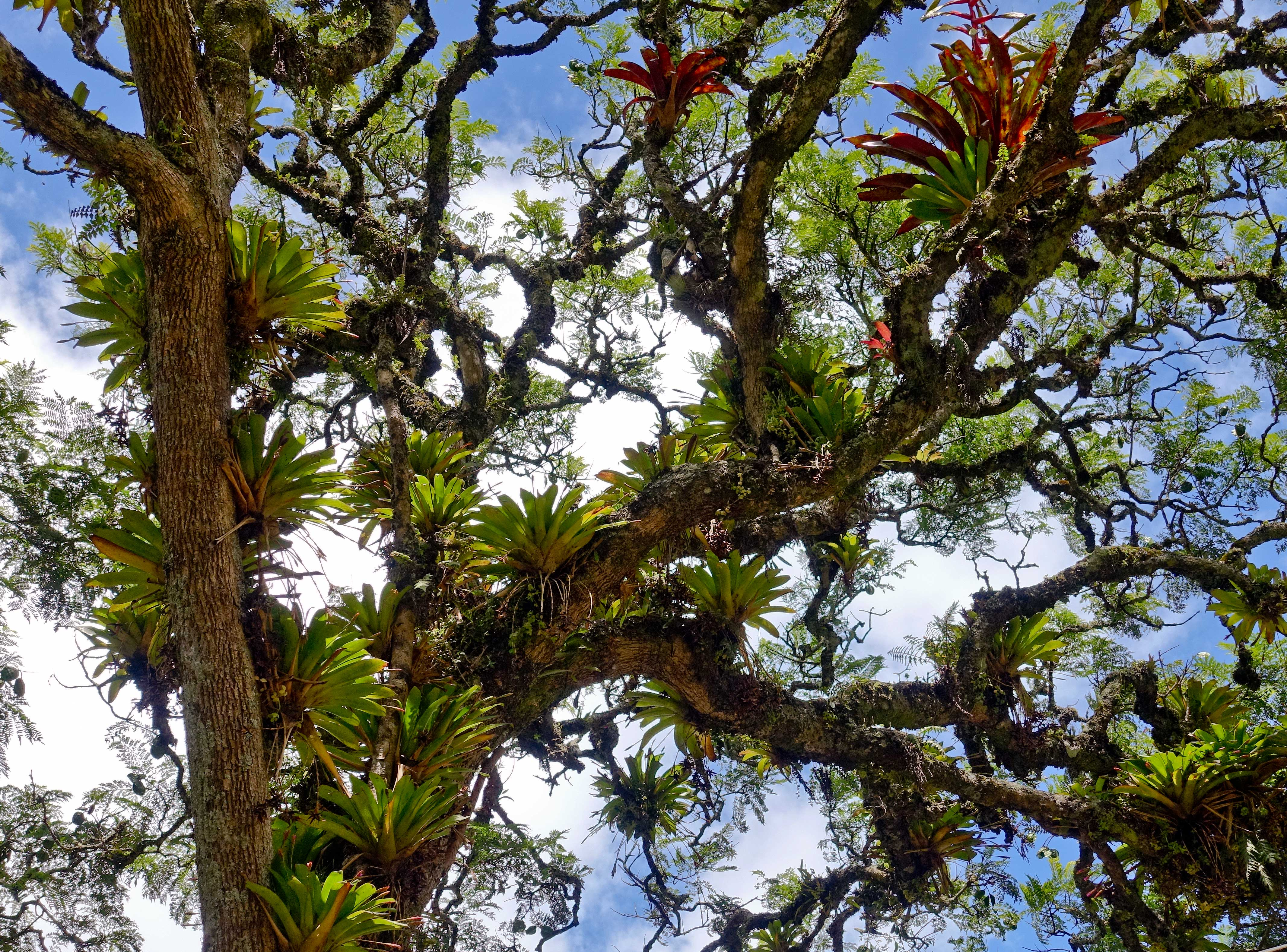 Baumbewohnende Bromelien = Epiphyten, in Baños, Provinz Tungurahua, Ecuador